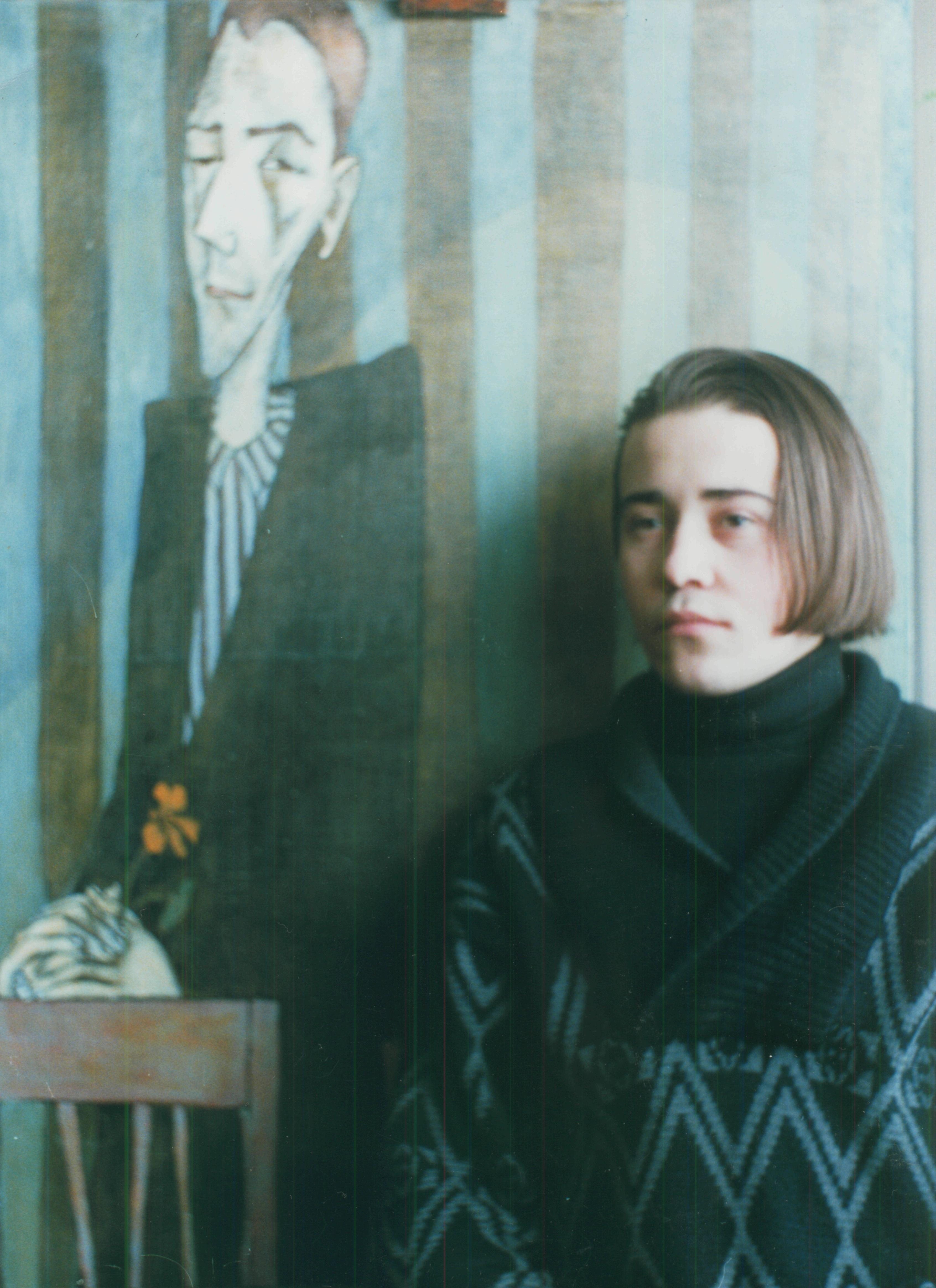 Витебский художник Олег Прусов